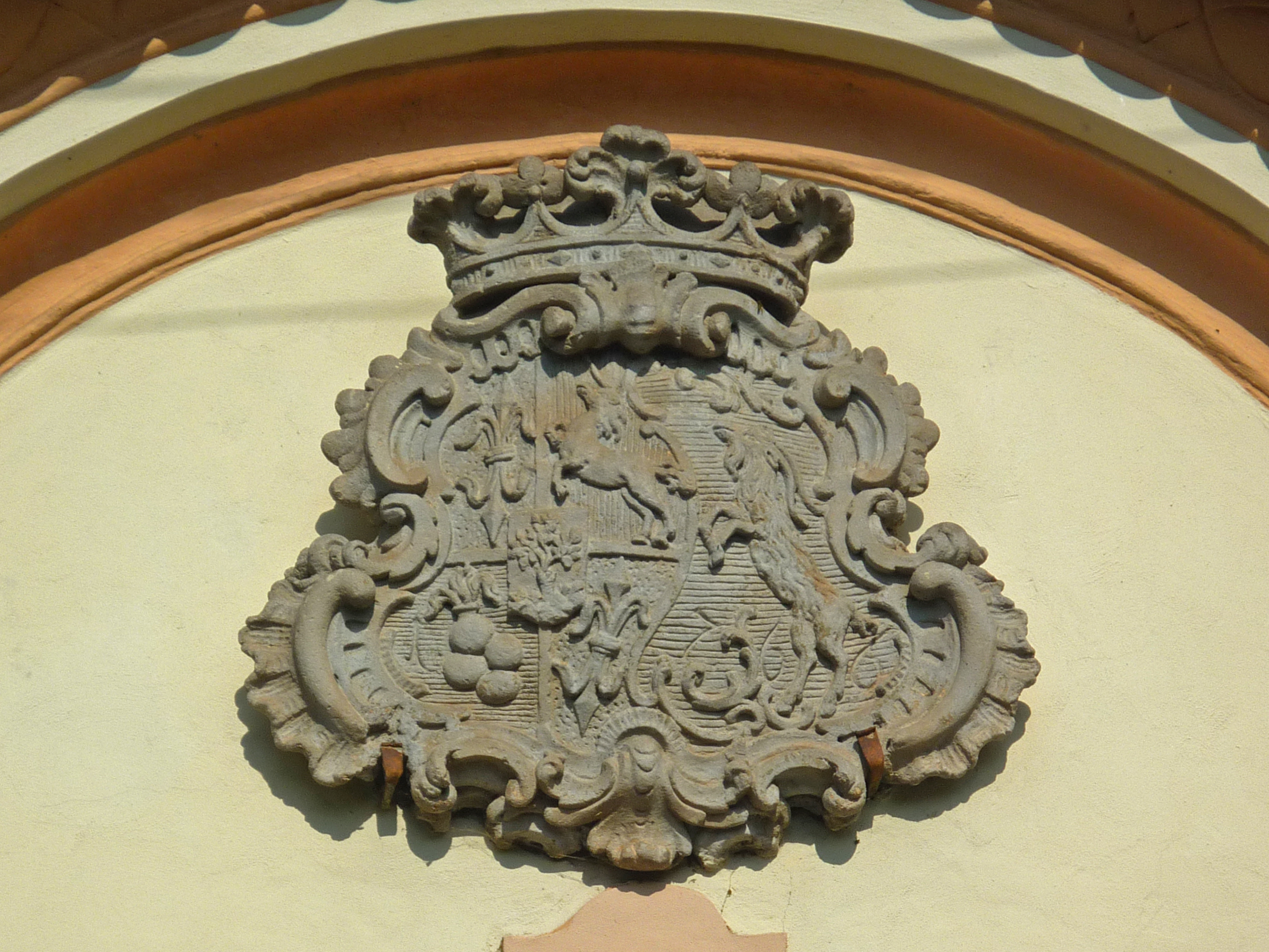 Kulhanek-Hohenems-Doppelwappen von 1766 am Torbogen zur ehemaligen Domäne Nr. 10 in Stecknitz (Stekník) in Nordböhmen anlässlich der Hochzeit von Johann Franz Graf Kulhanek von Klaudenstein († 1799) mit Maria Franziska Gräfin von Hohenems († 1795).